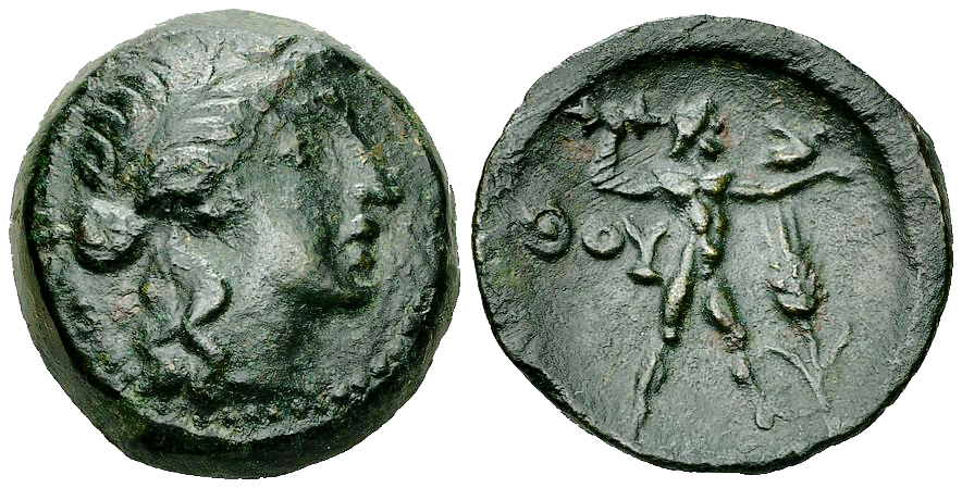 Κεφαλή της Δήμητρας φέροντας στεφάνι από σιτηρά Ο Δίας ο Ιθωμάτας σε διασκελισμό, κρατώντας κεραυνό με το δεξί του χέρι και με αετό ιστάμενο (γαντζωμένο) στον αριστερό καρπό του